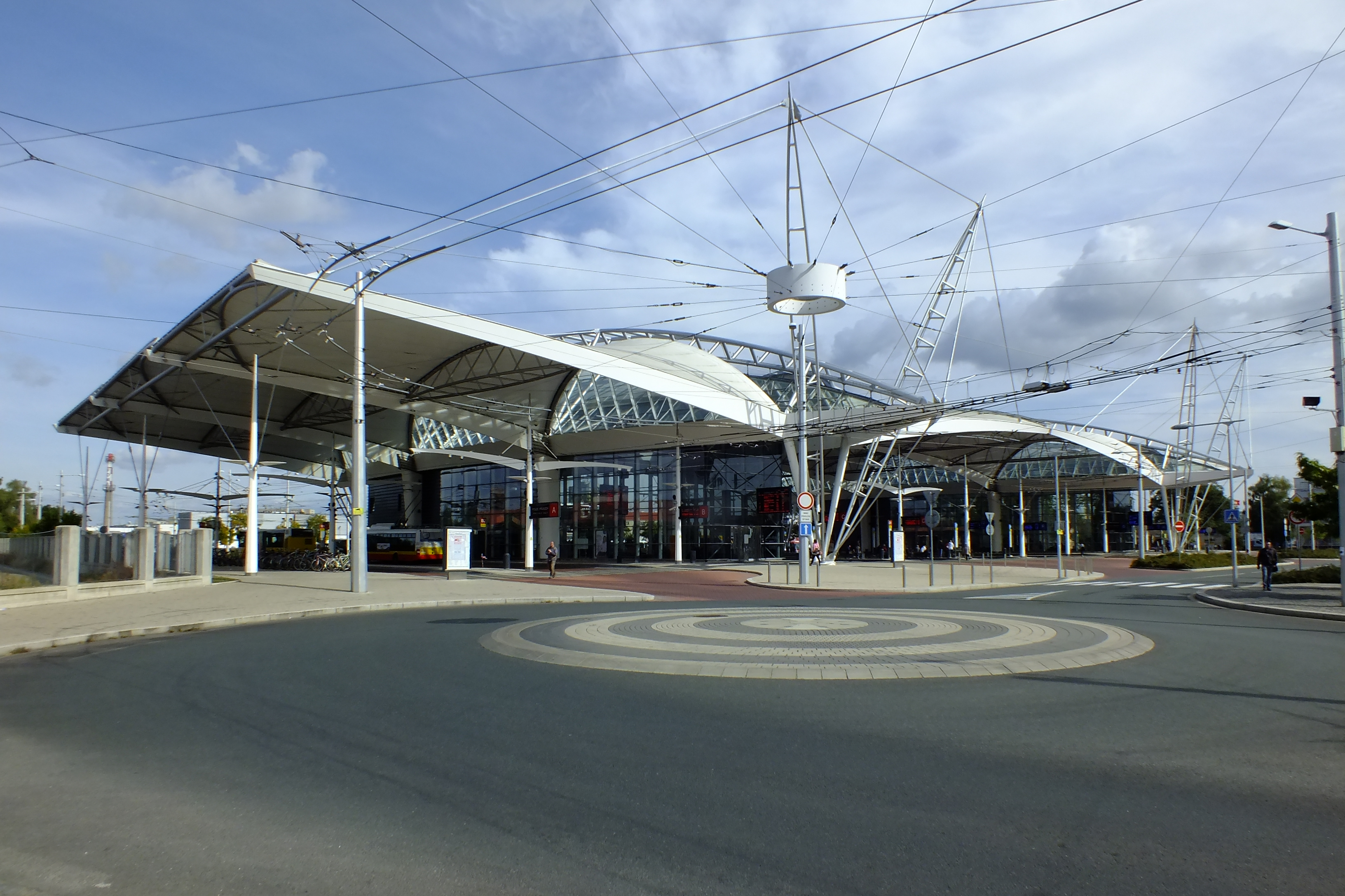 Hlavní přestupní terminál